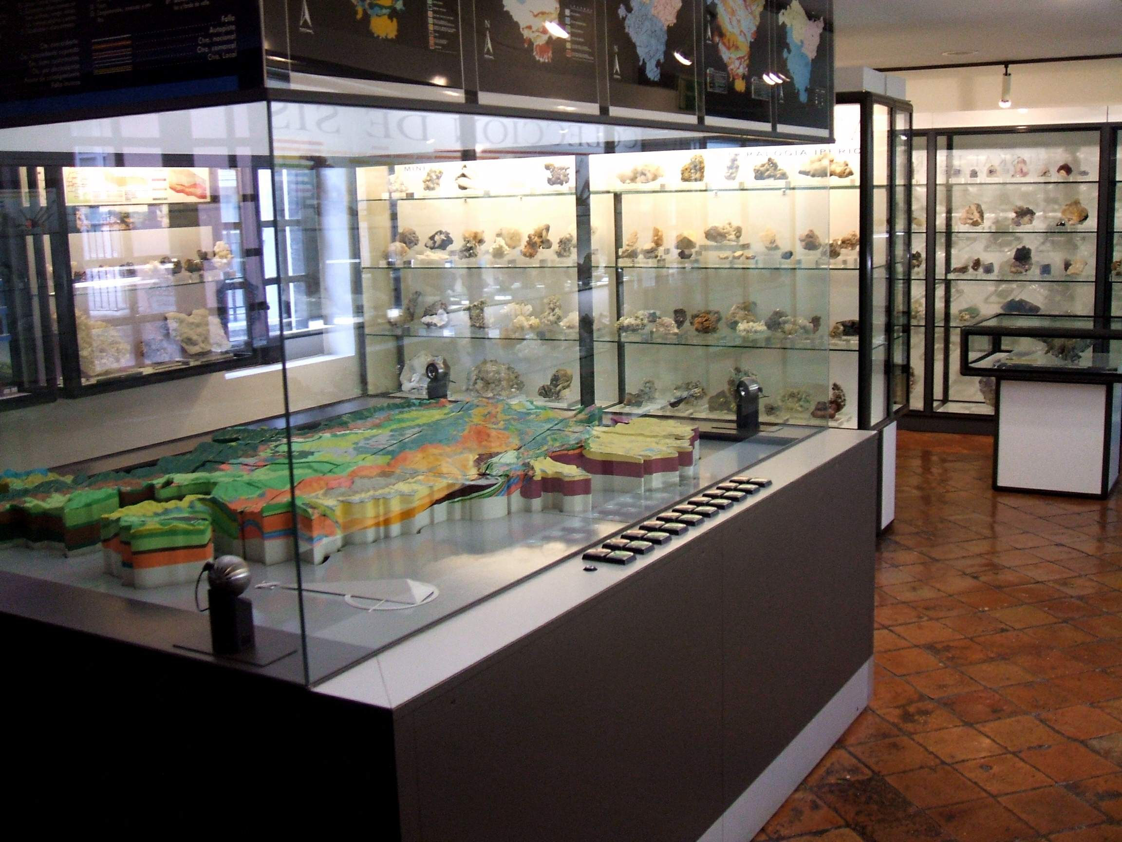 Sección de Geología del Museo de Ciencias Naturales de Álava (Torre de Doña Ochanda), en Vitoria-Gasteiz